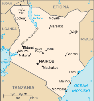 Mapa Kenii na podstawie CIA World Factbook